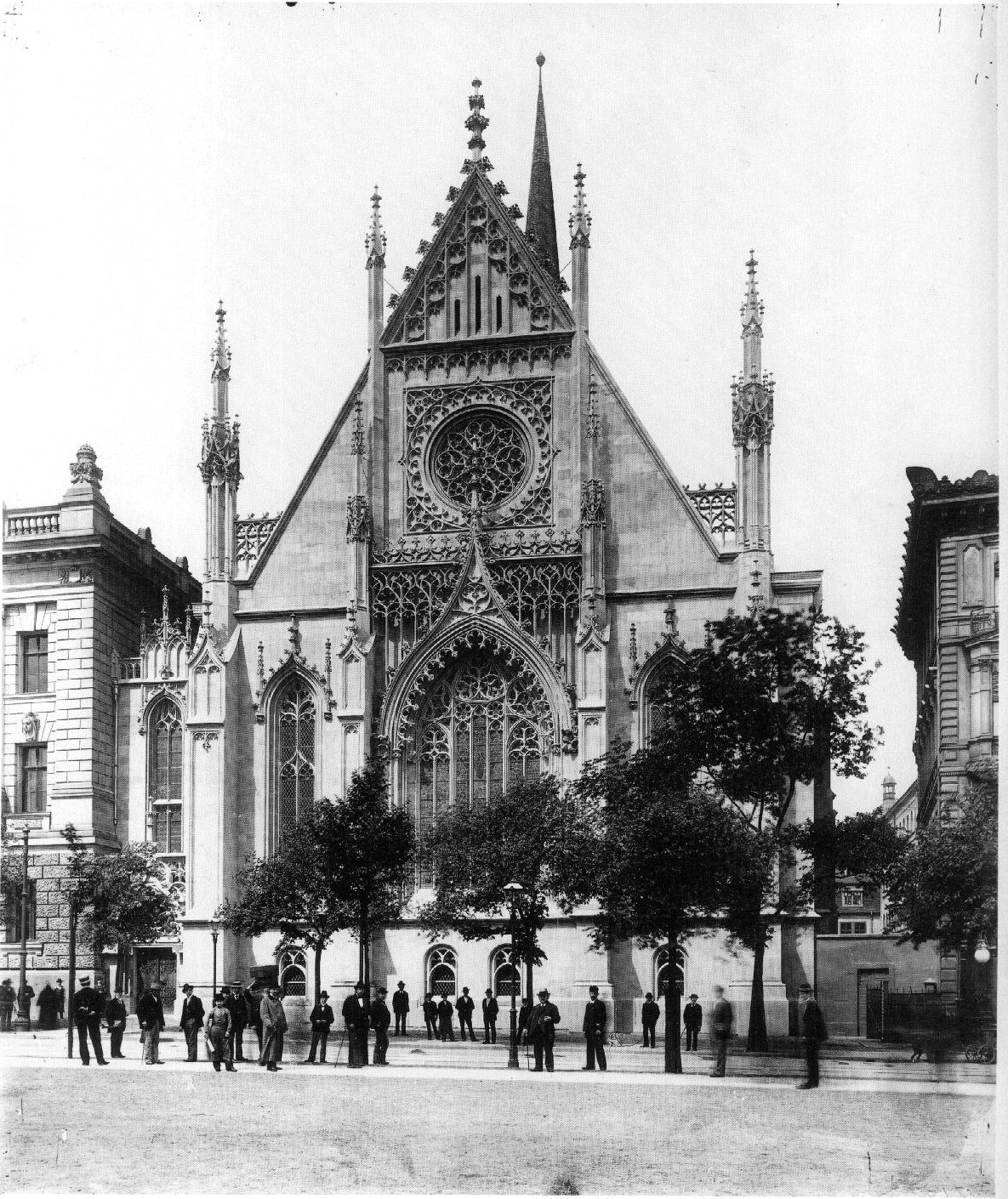 Paulinerkirche (Universitätskirche St. Pauli) am Augustusplatz Nr. 5 um 1900.